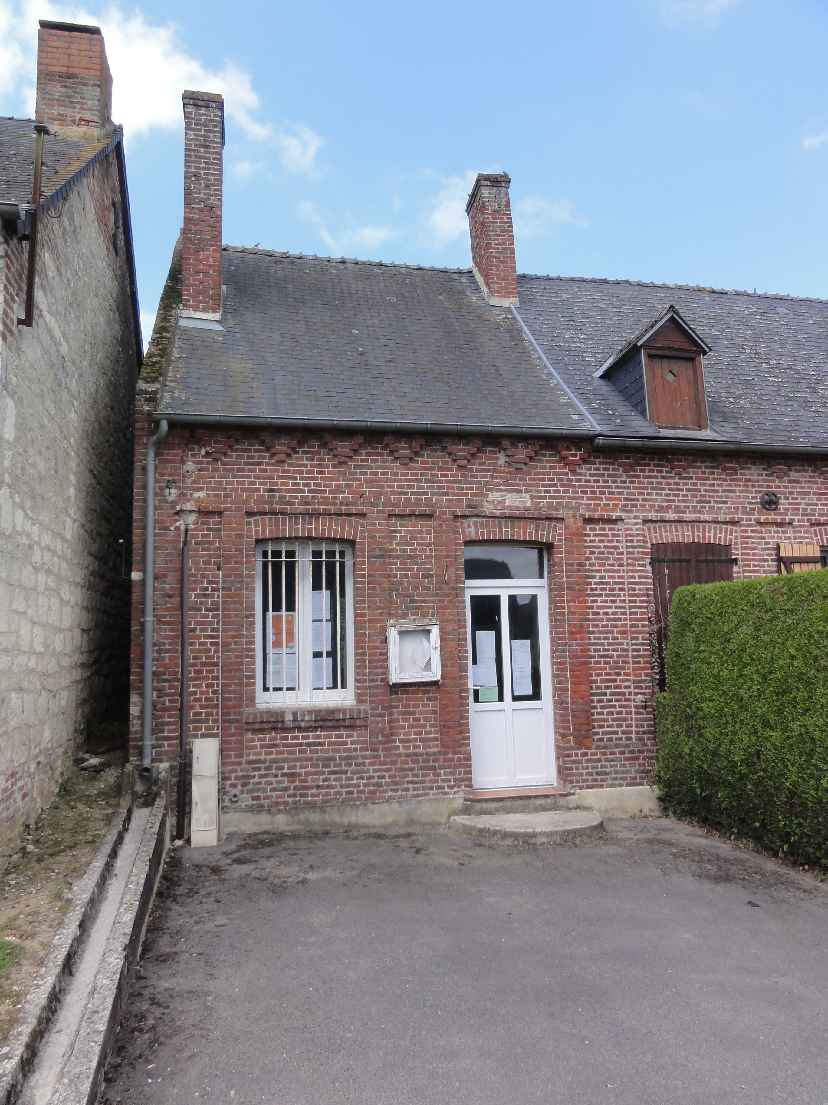 Saint-Pierremont (Aisne) mairie